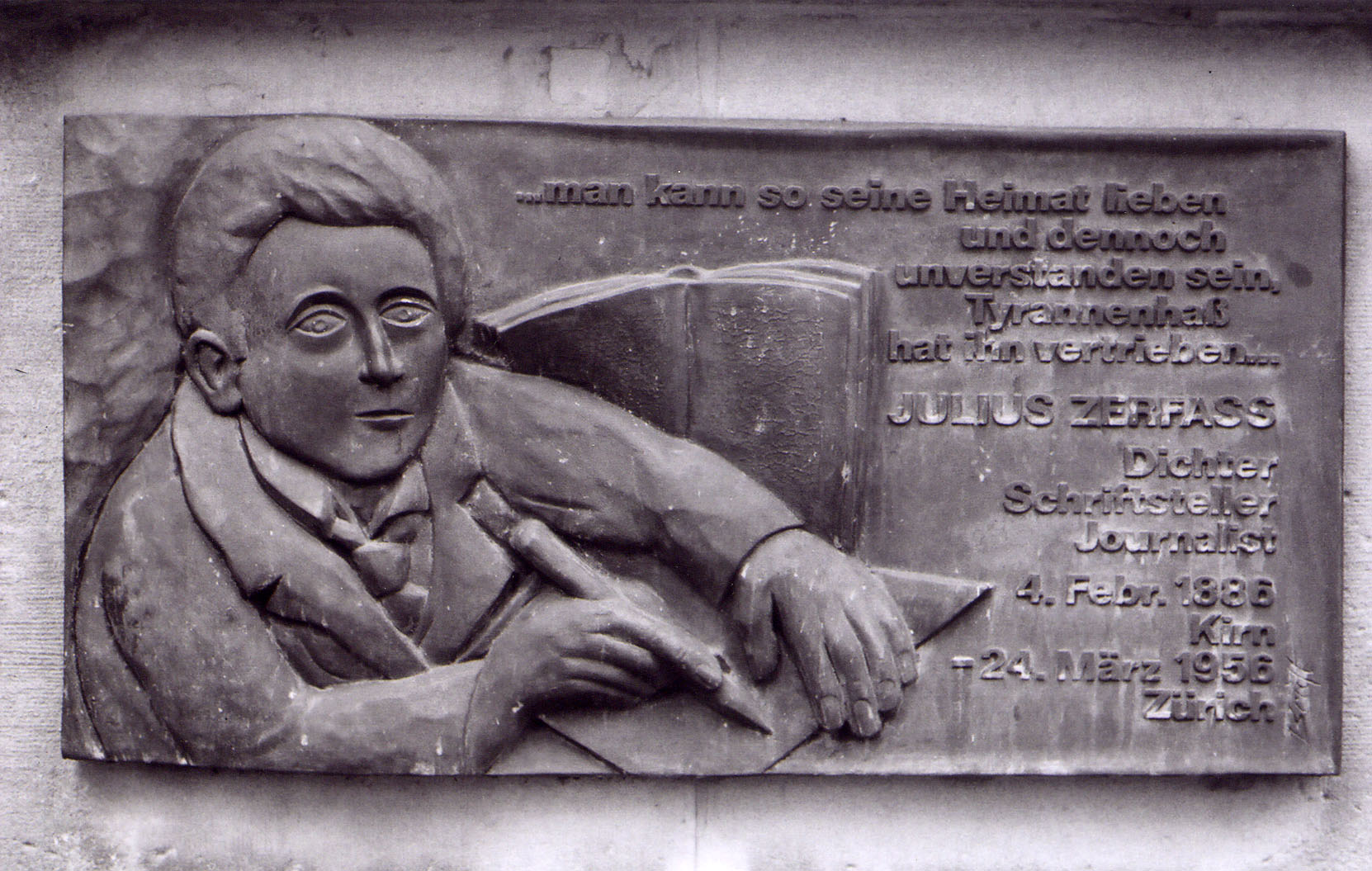 Gedenktafel für Julius Zerfaß in Kirn, Obersteiner Straße/Lohweg